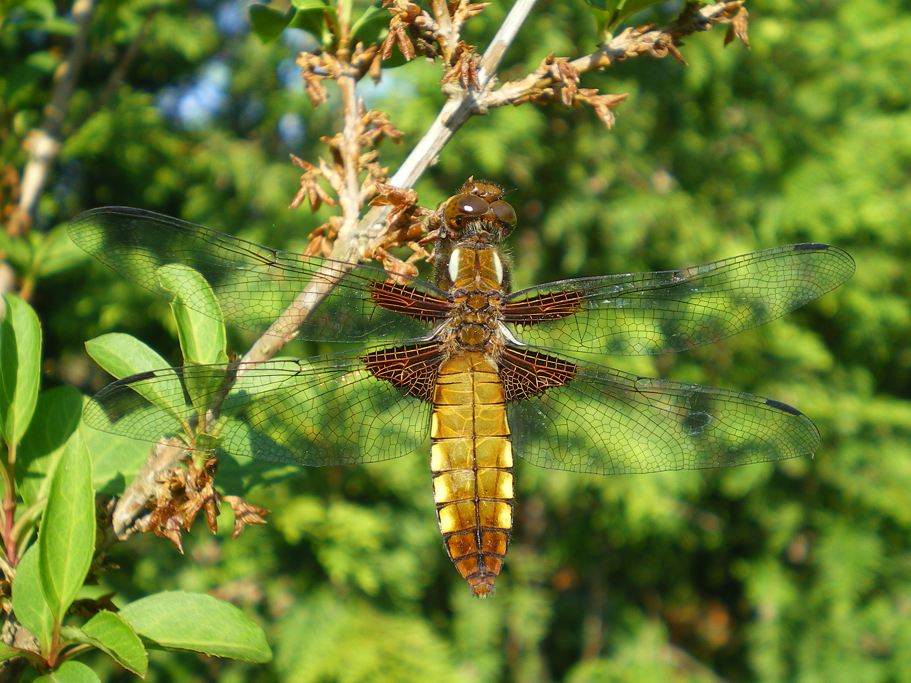 Plattbauch (Libellula depressa), junges Weibchen